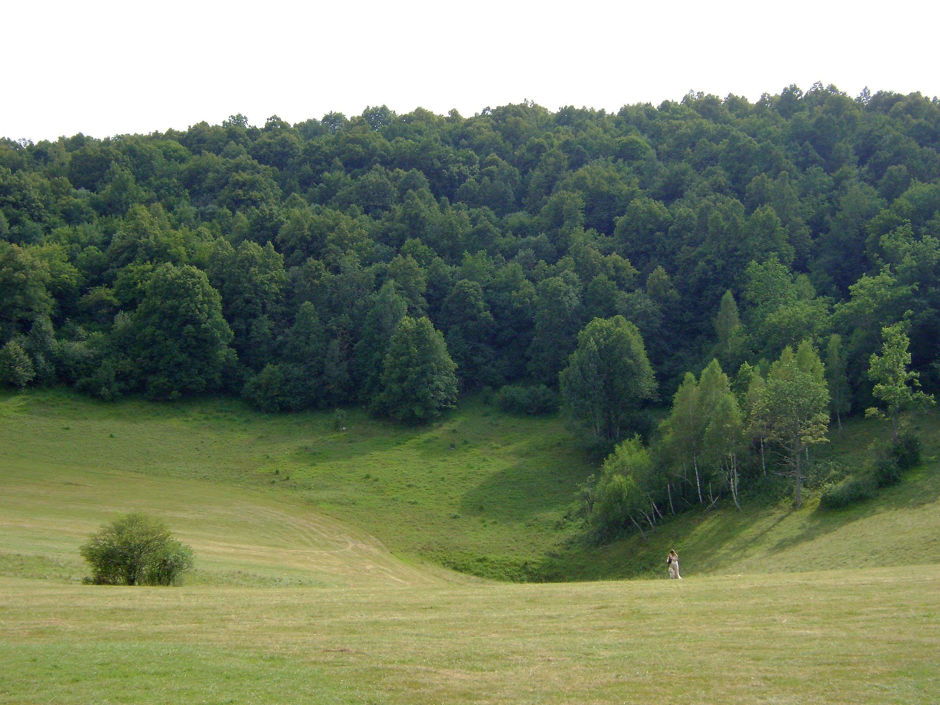 Jedna z najvýznamnejších krasových jám na Slovensku "Veľký závrt" (hovorovo jaskyniarsky Mutyurbaňa, syn.: Pracovisko 83, G5-2) sa nachádza na Silickej planine v Slovenskom krase v nadmorskej výške 530 m n.m. Na základe nádejných geofyzikálnych meraní sa v závrte celé roky uskutočňoval/a intenzívny speleologický prieskum, resp. prolongácia. Počas jedného jaskyniarskeho týždňa, ktorý v osemdesiatych rokoch minulého storočia v rámci Slovenskej speleologickej spoločnosti organizovala rožňavská jaskyniarska skupina (Oblastná skupina SSS č. 3, Rožňava) v ňom vyše 100 ľudí odpracovalo viac ako 4000 pracovných hodín. Napriek dosiahnutej hĺbke vyše 40 m sa jaskyniarom nepodarilo dosiahnuť ani úroveň kompaktnej horniny ani predopokladané jaskynné priestory. V súčasnosti je výstuž v pripovrchových častiach značne staticky porušená.